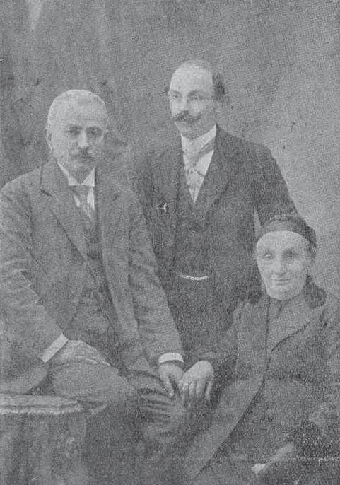 Strezovi Family